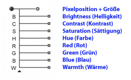 U Point-Kontrollpunkte und deren Erklärung